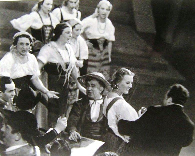 Hajmássy Ilona a Staats Opera színpadán.